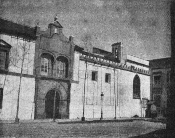 Colegio de Santa María de Jesús. Sevilla. Andalucía, España.